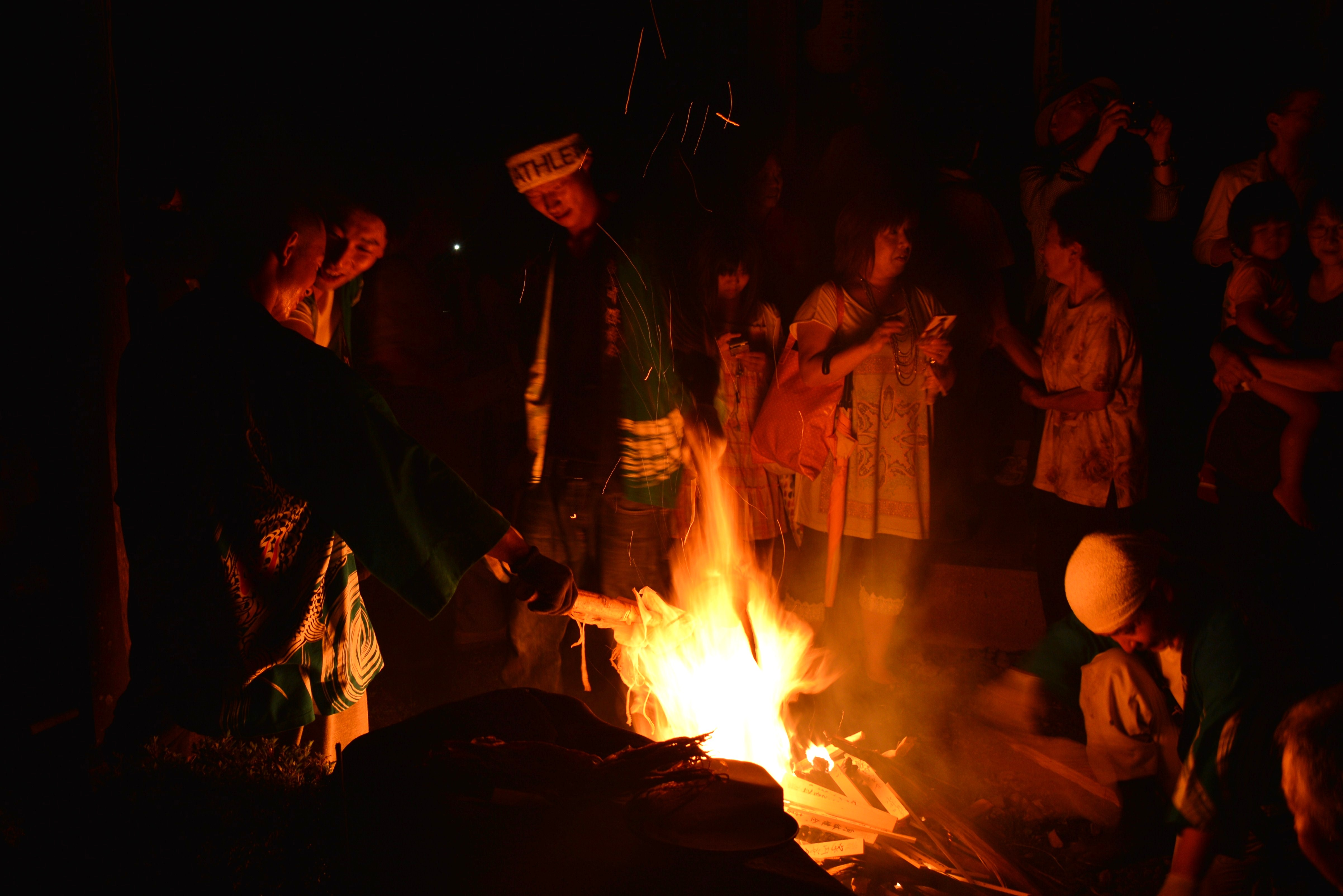 2013年8月24日に京都市の雲ケ畑で行なわれた「松上げ」直後の福蔵院の様子